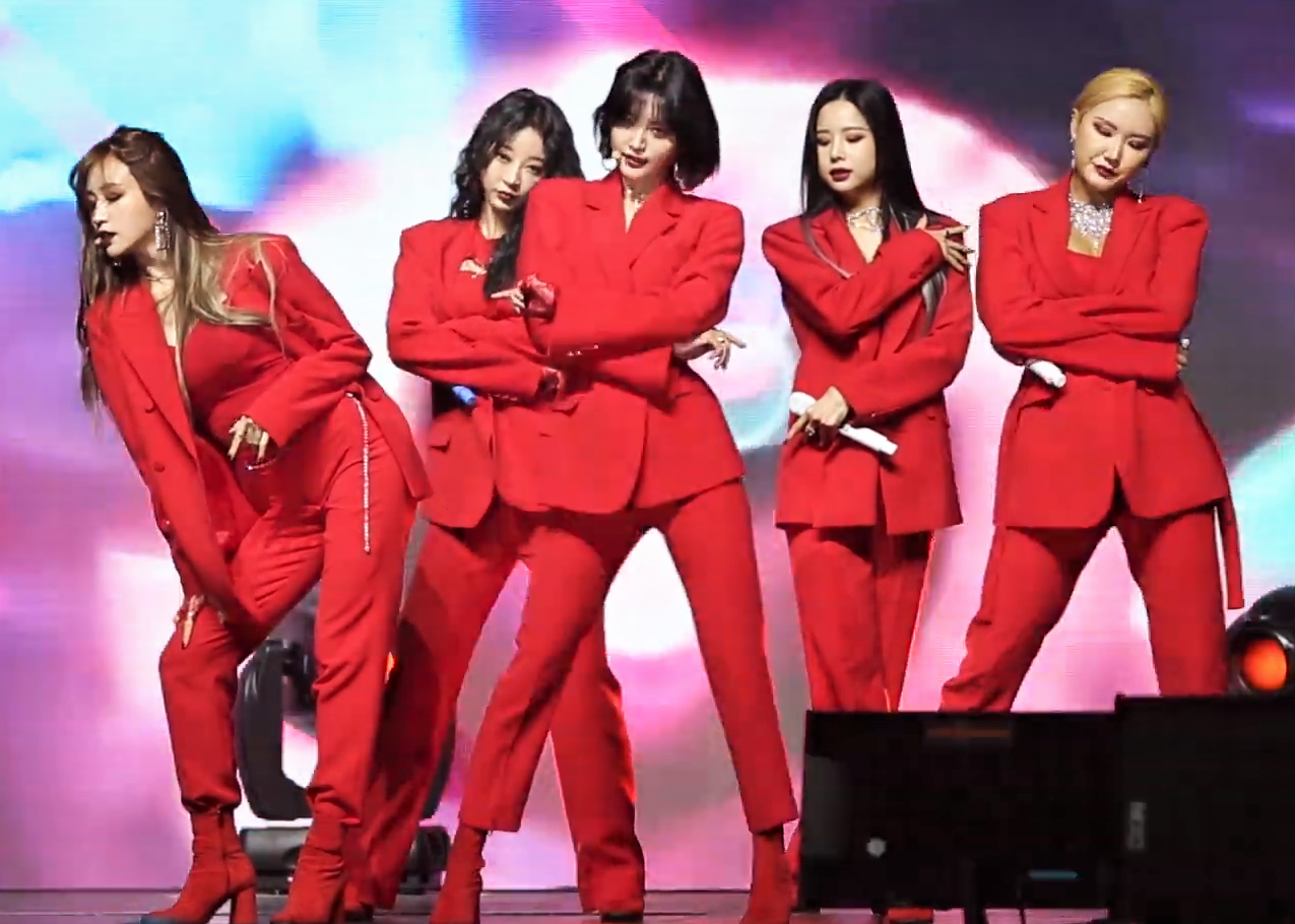 2년만의 완전체 컴백 EXID 쇼케이스 '알러뷰'